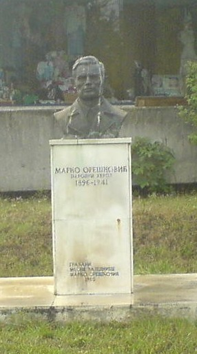 Споменик Марку Орешковићу на Новом Београду.